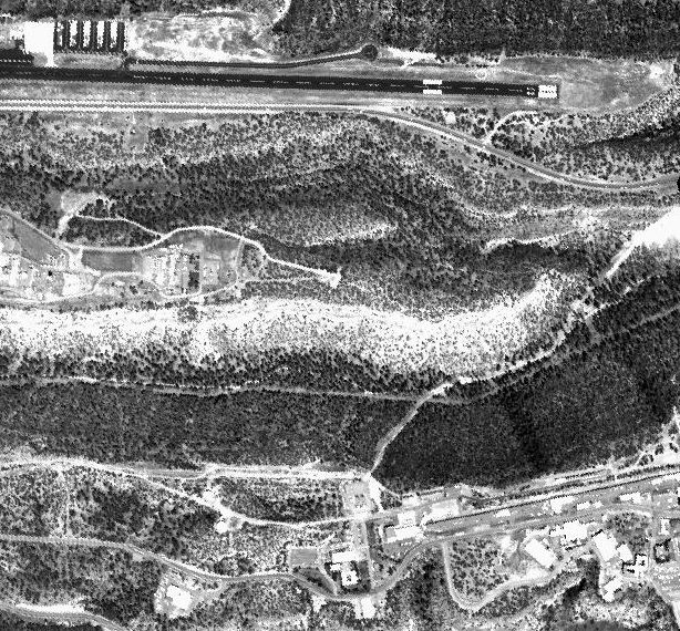 AVIRIS-Szene im Gebiet von Los Alamos, aufgenommen im Jahr 2004 Ausschnitt eines Quicklooks (